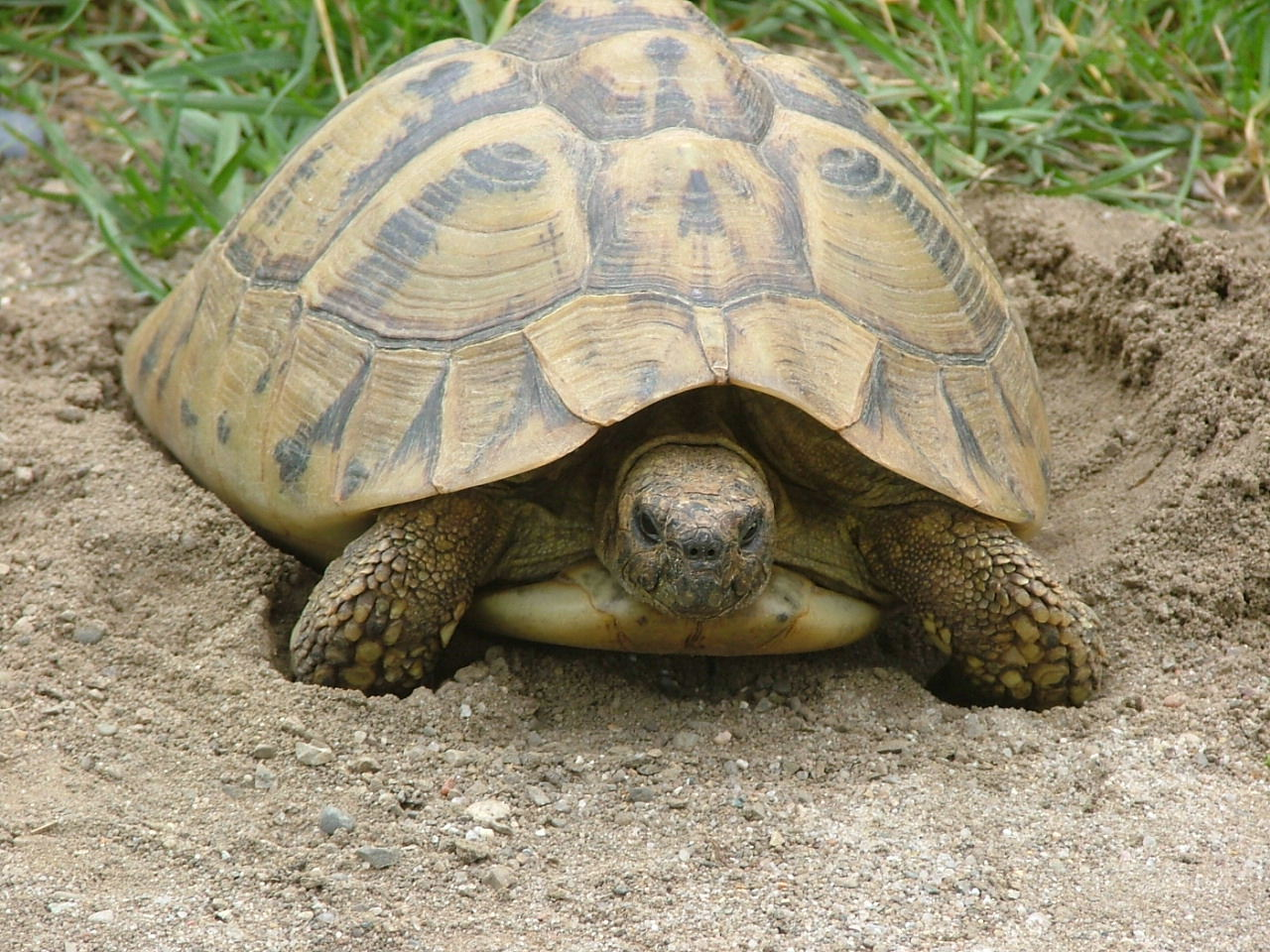 Testudo hermanni boettgeri